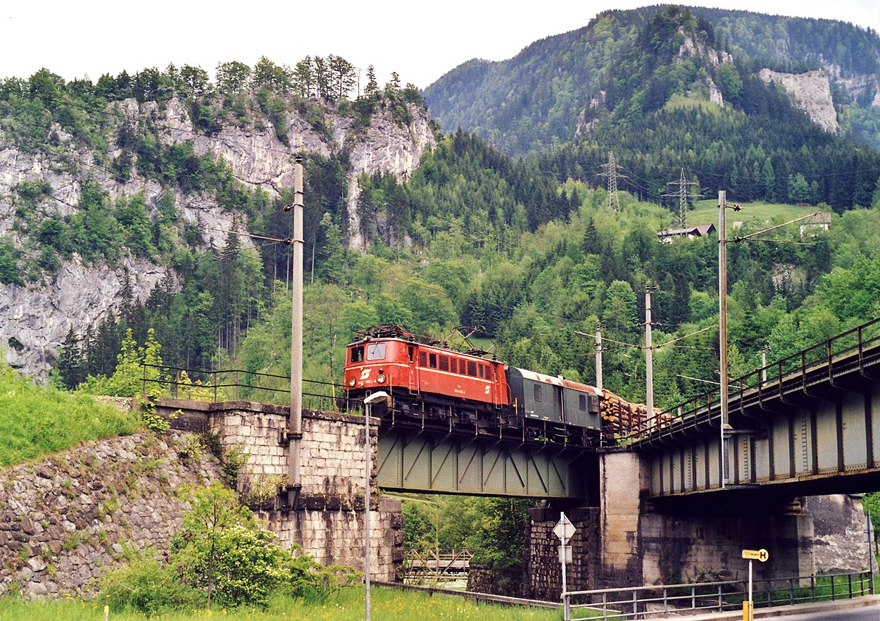 ÖBB 1040 003-4 mit Güterzug in Hieflau.